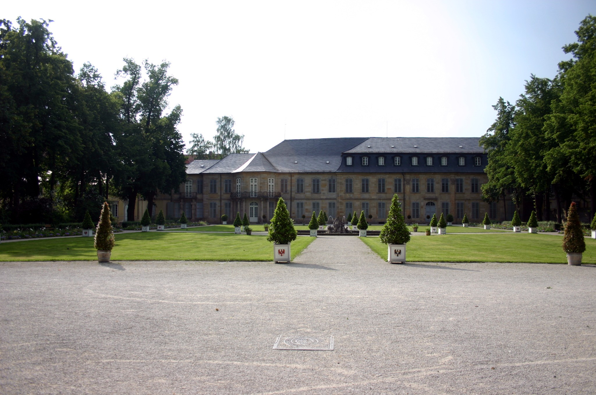 Rückansicht des Neuen Schlosses vom Hofgarten aus